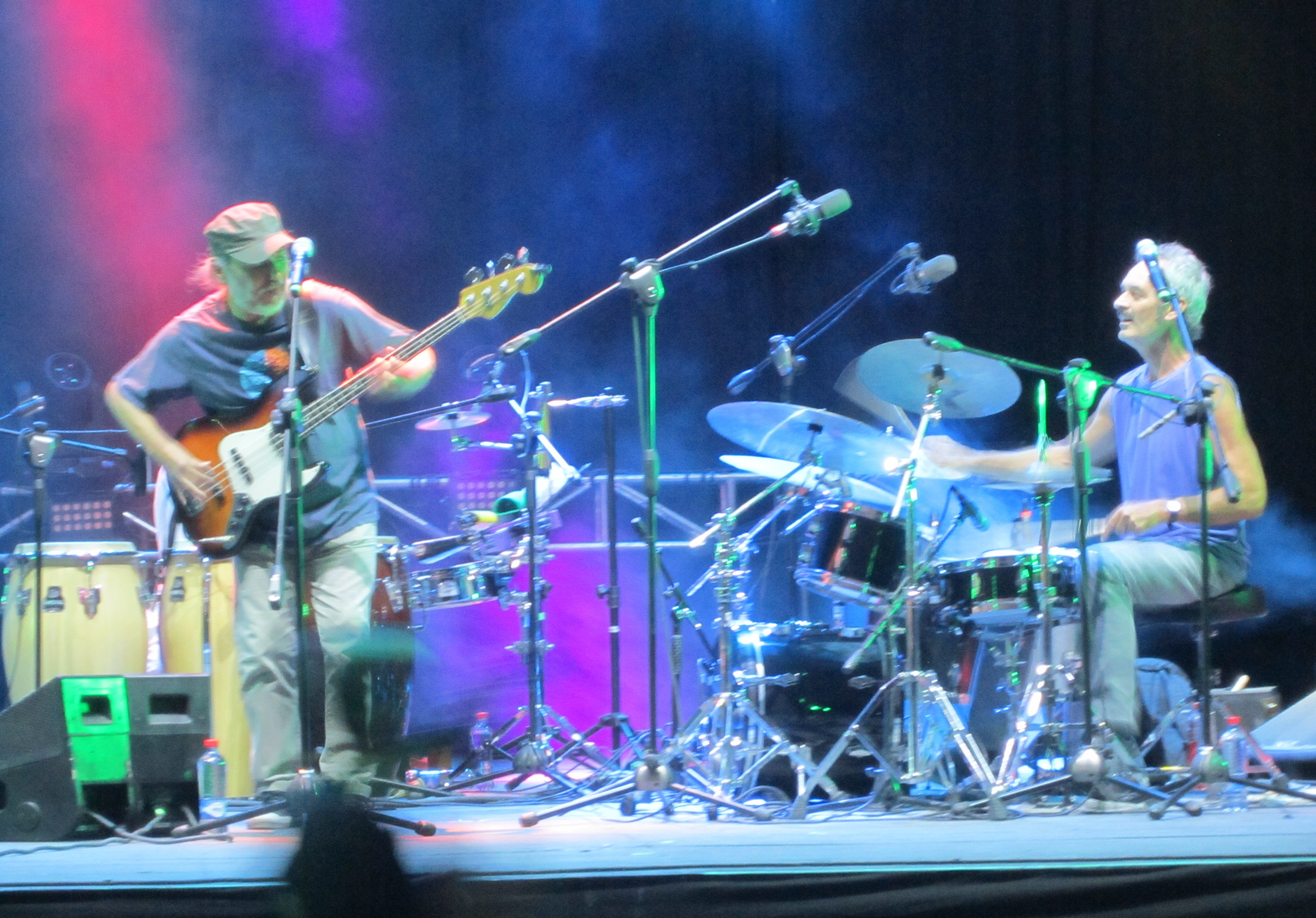 La Marraqueta en el Festival Internacional Providencia Jazz